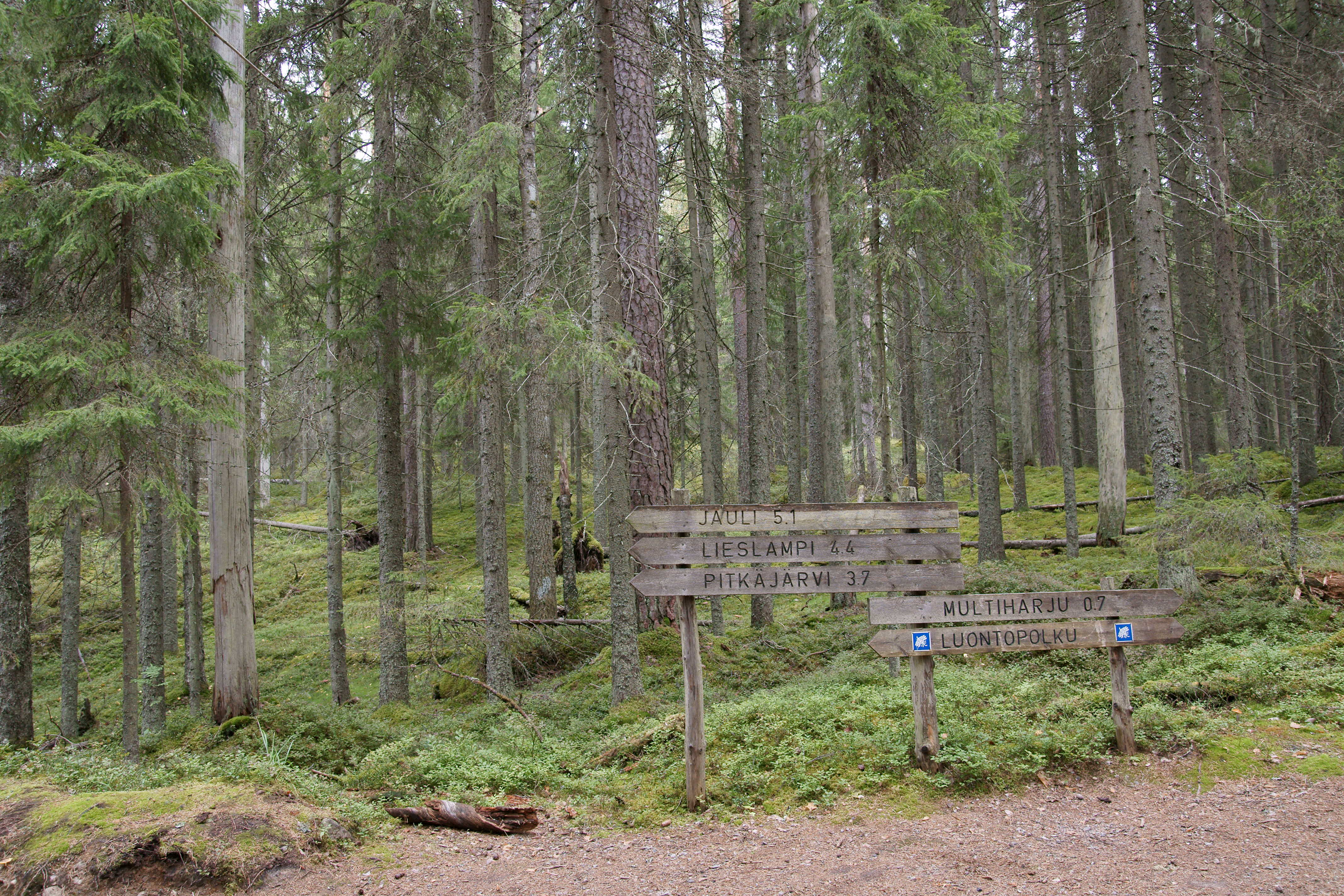 Luontopolkua Multiharjulla, Seitsemisissä.